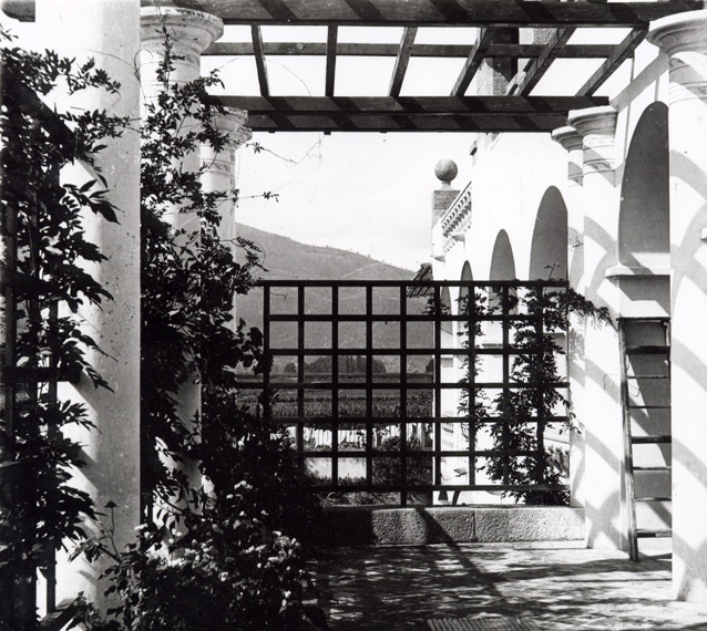 Ampliació d'un mas propietat de la família Burch